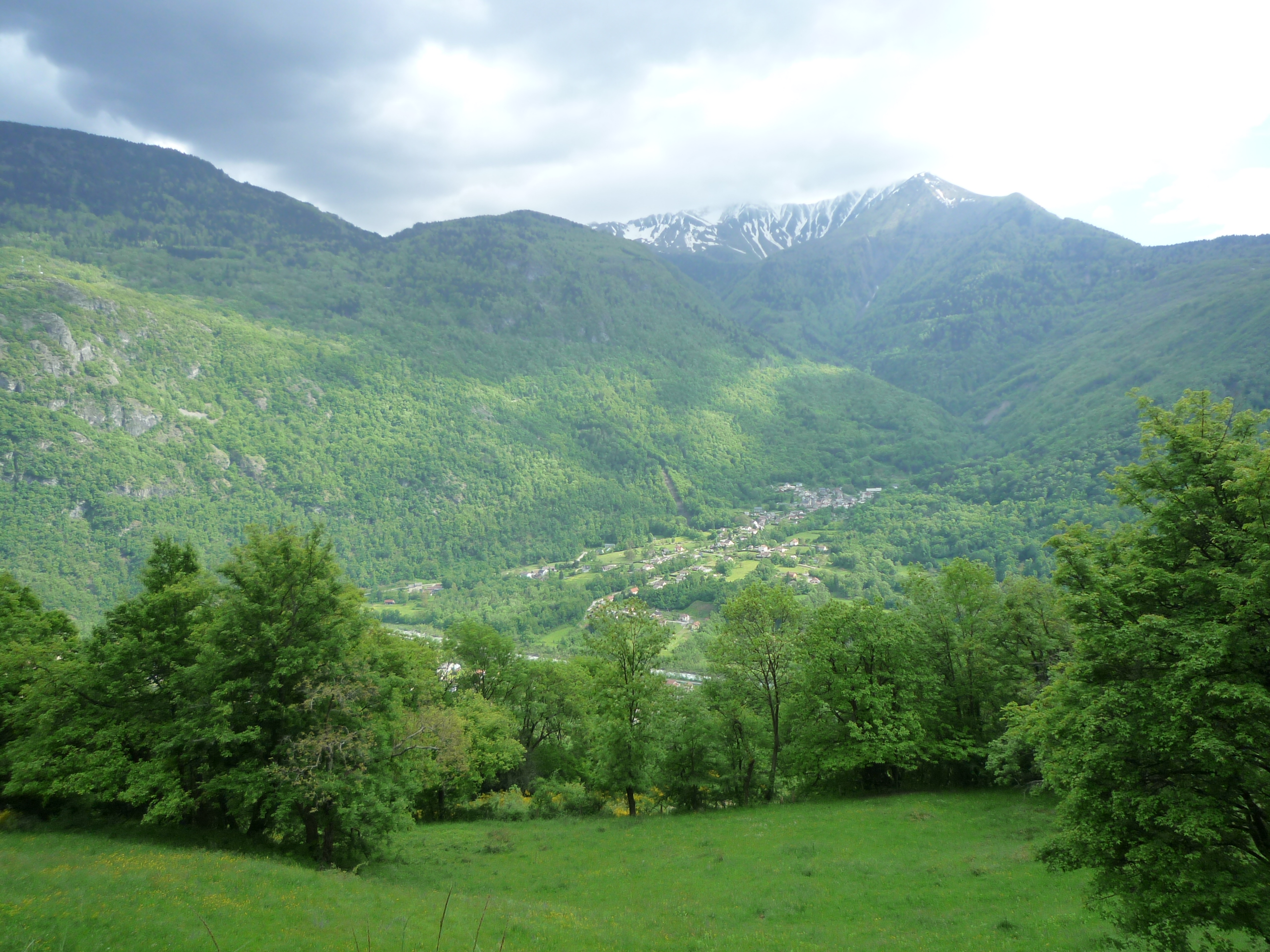 Saint-Barthélemy-de-Séchilienne vue depuis Séchilienne. En arrière-plan, le Grand Serre.